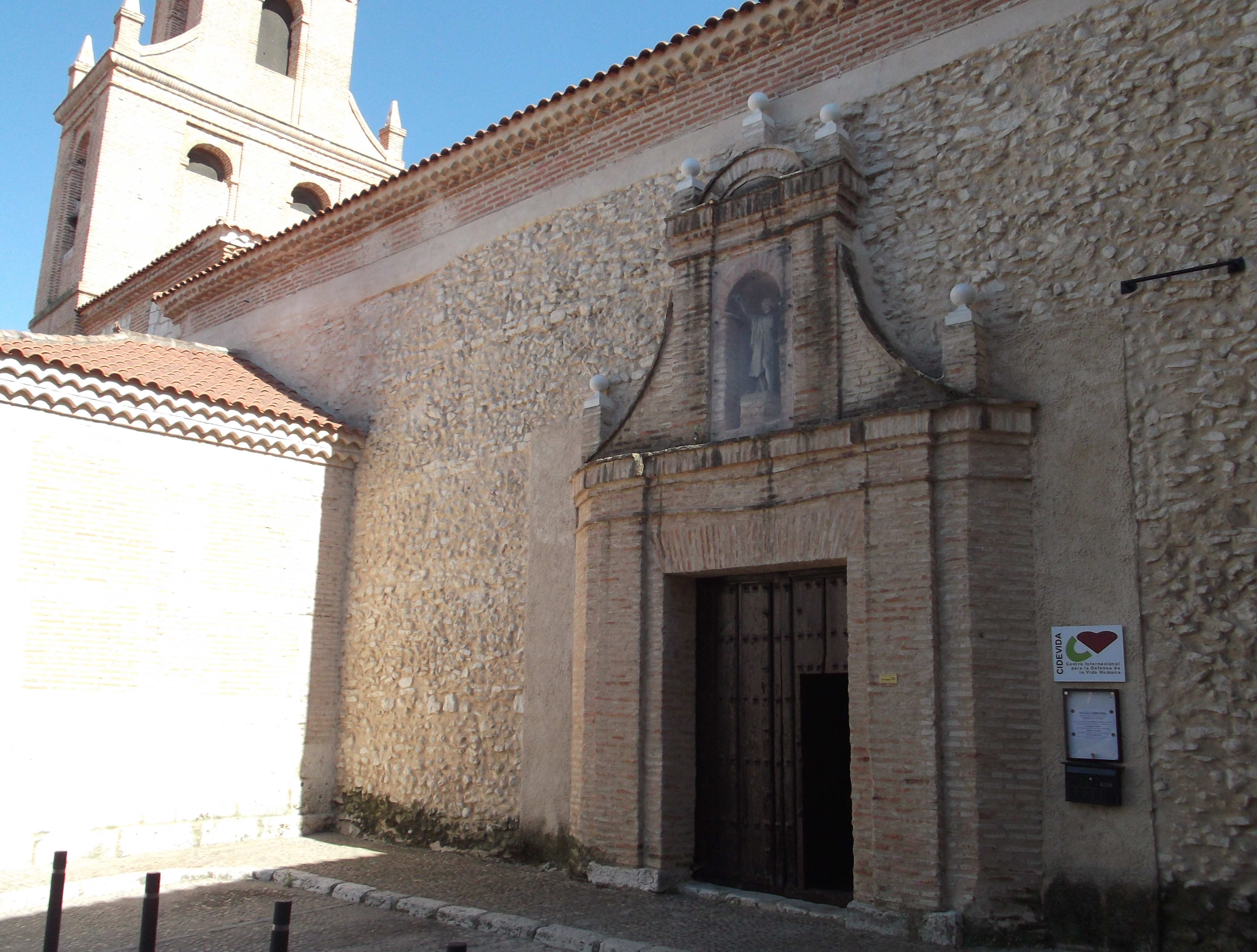 Fachada principal del museo al norte.